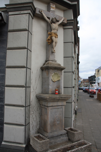 Das Bonnkreuz auf dem Bonner Platz in Düren